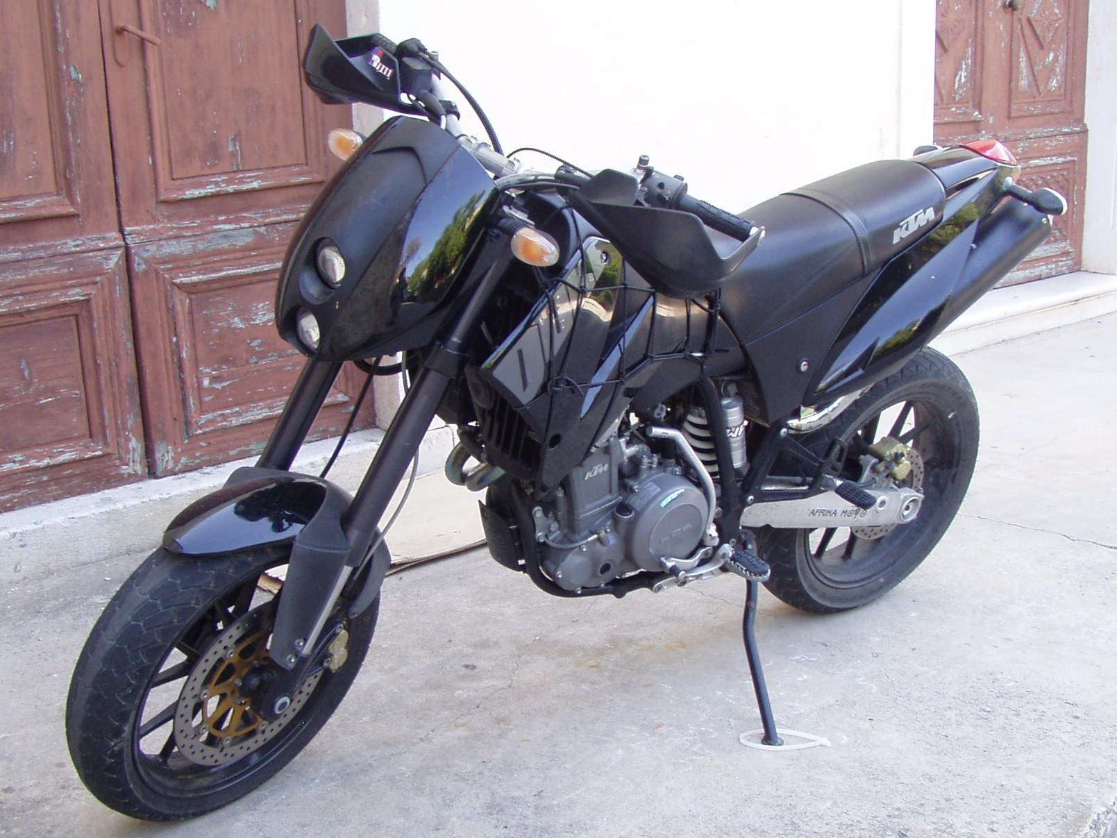 KTM Duke